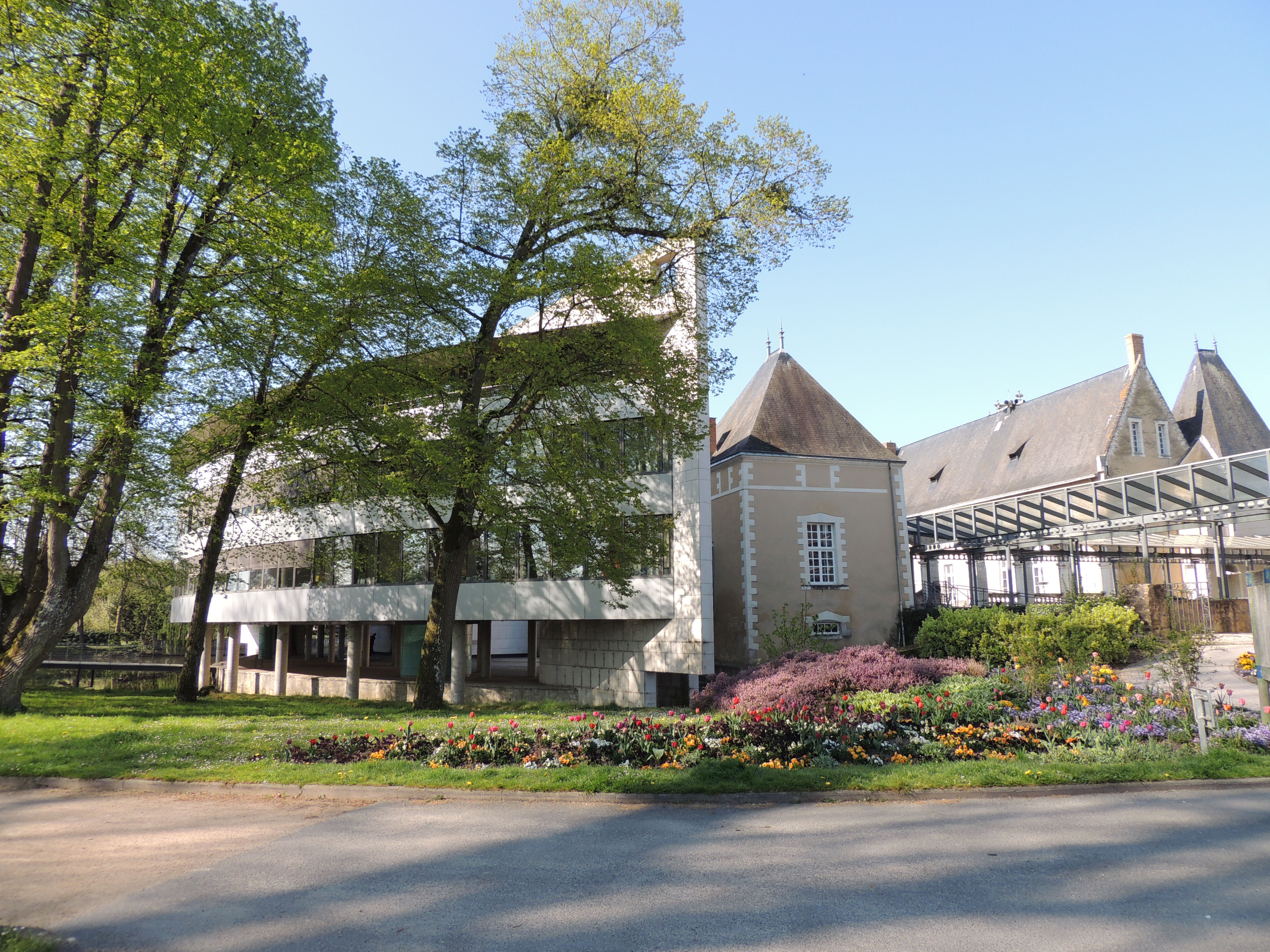 La nouvelle mairie de La Flèche et le château des Carmes (en arrière-plan), vus depuis l'entrée du Parc des Carmes.